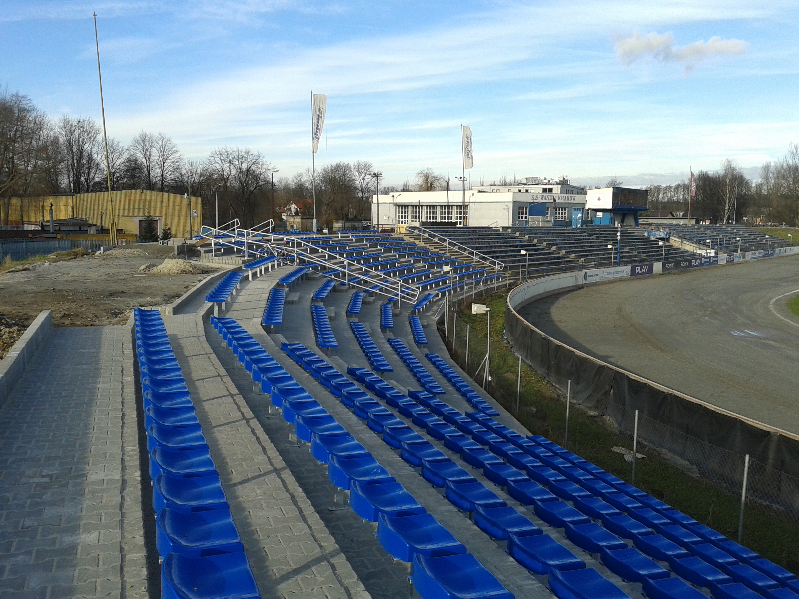 Wanda Kraków Stadion 2014